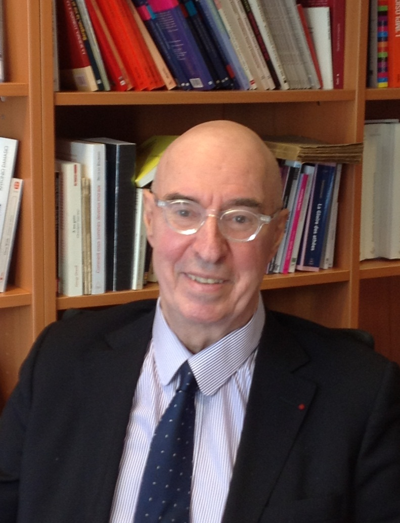 Dominique Lecourt mars 2013